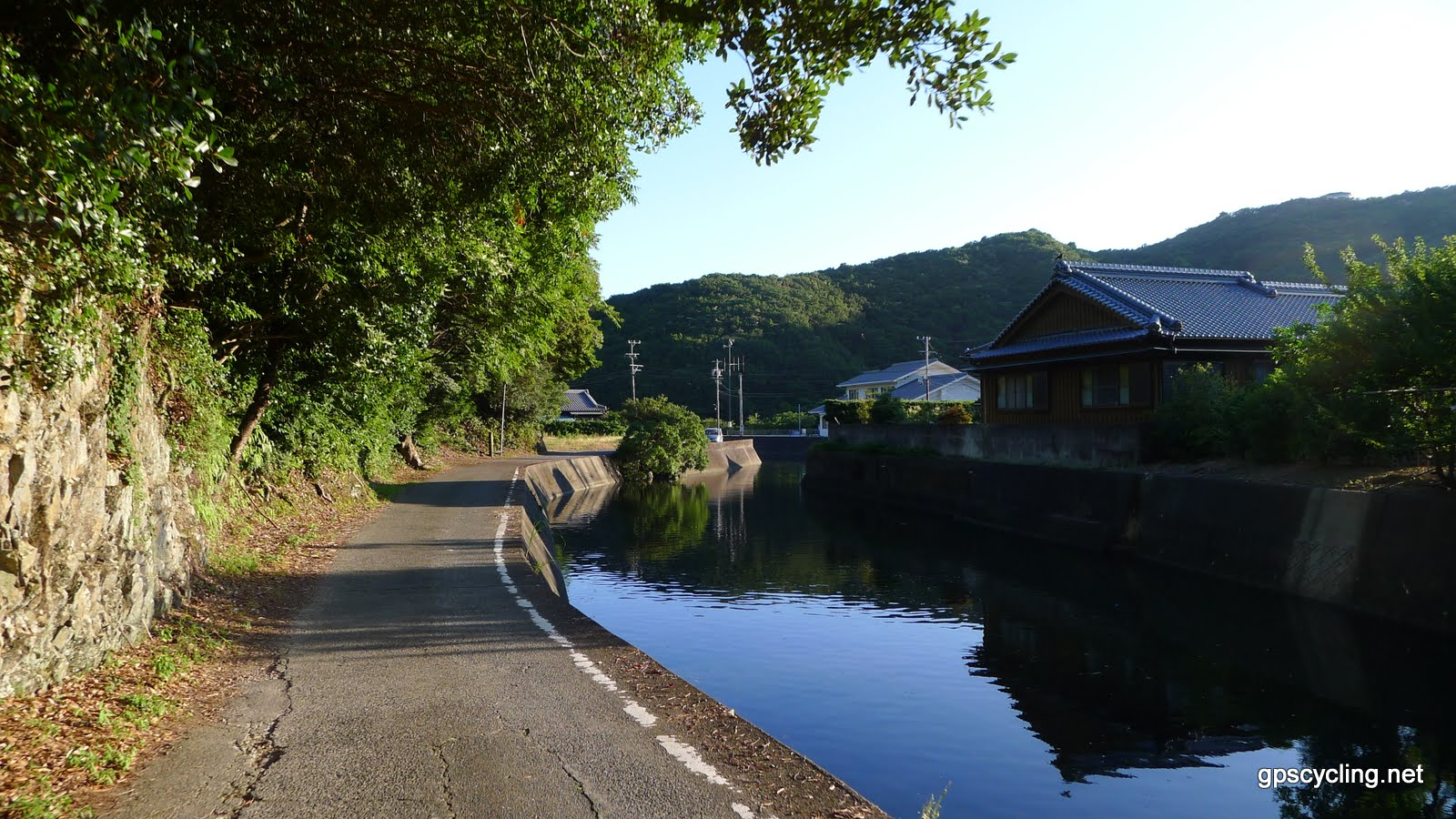 浜島町迫子